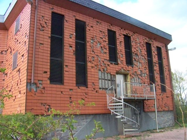 Hochwasserbehälter auf dem Muldensteiner Berg